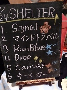 amiinaセトリボード(20150724(1))